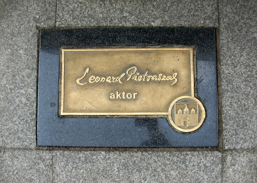 Bydgoska Aleja Autografów - Leonard Pietraszak, 2012